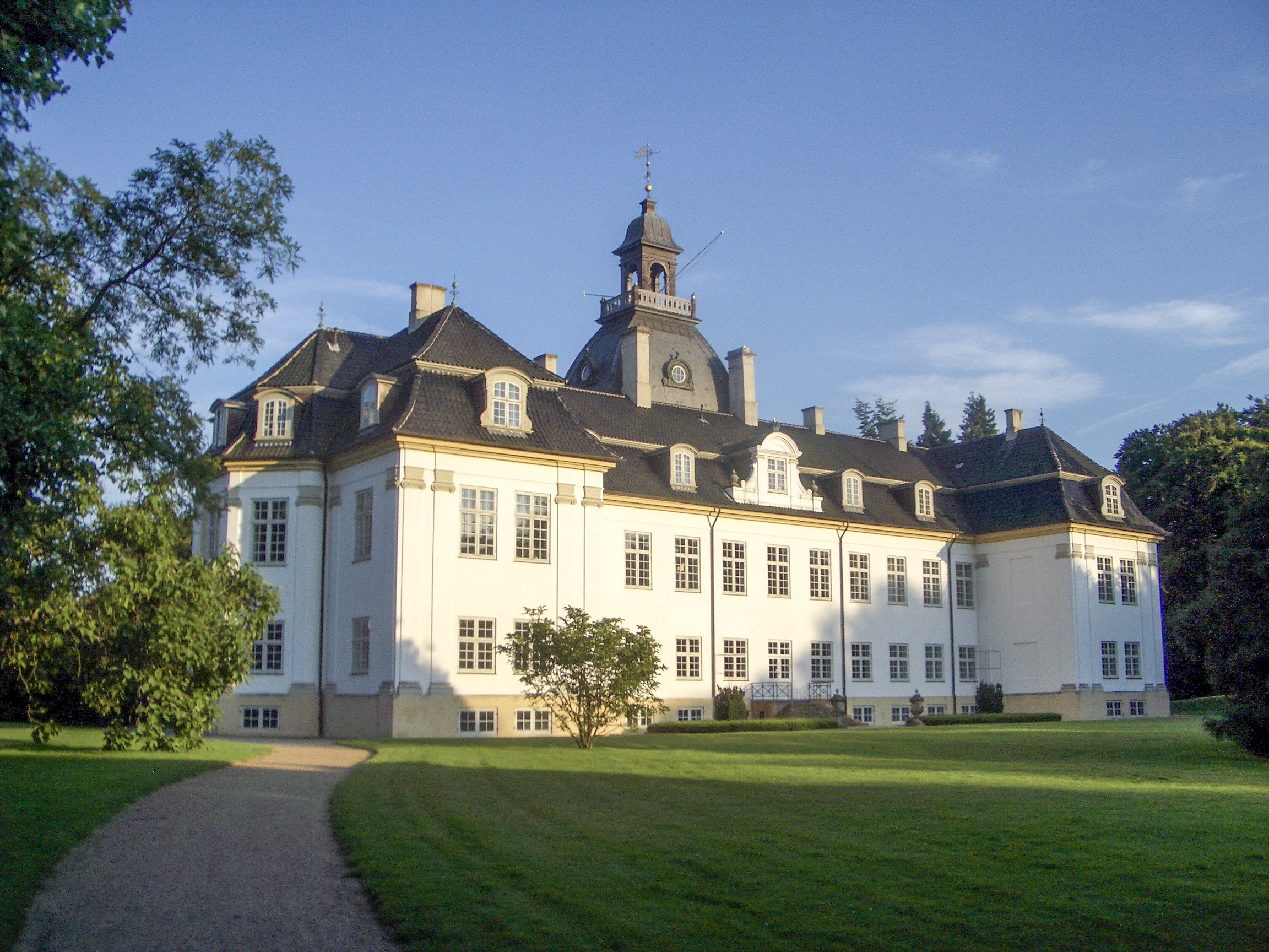 Charlottenlund Slot in Charlottenlund, near Copenhagen, Denmark